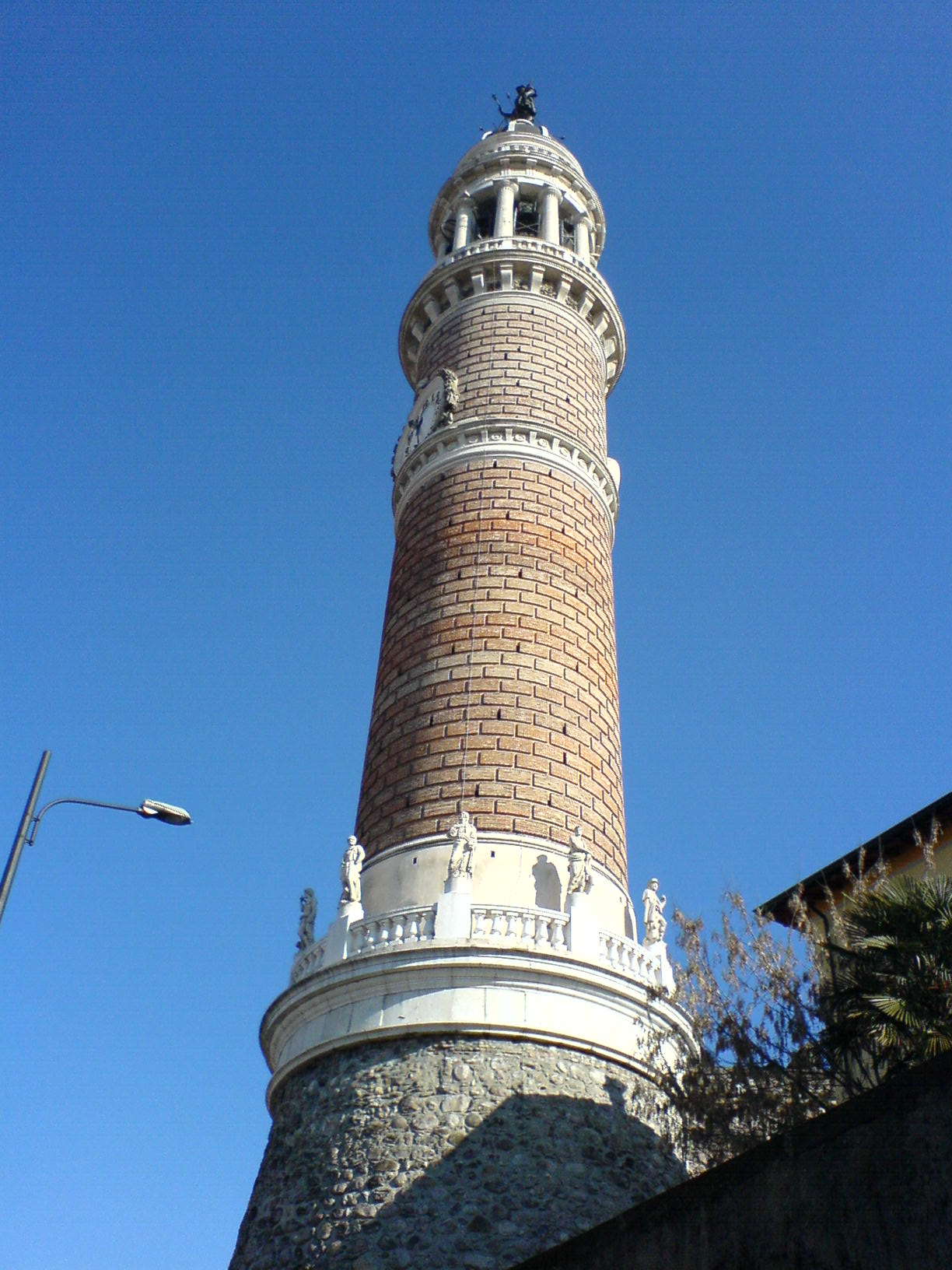 Torre del Popolo a Palazzolo sull'Oglio, in provincia di Brescia, vista da via Bissolotti